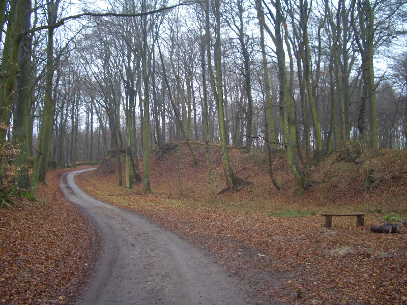 Im Nordosten des Naturschutzgebiets Maibachtal in Mecklenburg-Vorpommern. Hohlweg durch Buchenwald mit Feuerstelle rechts im Bild.